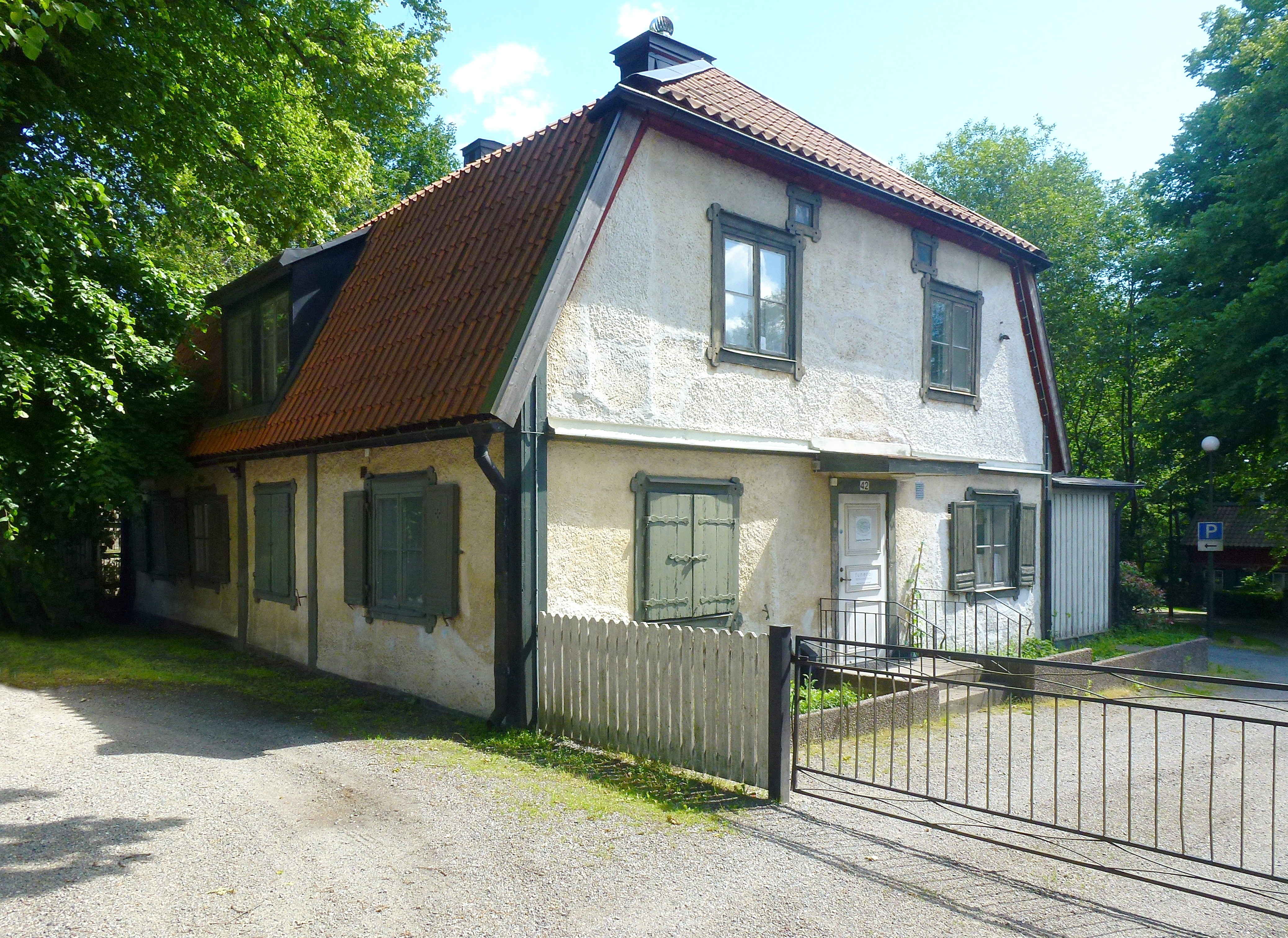 Lilla Sköndal (tidigare värdshus)